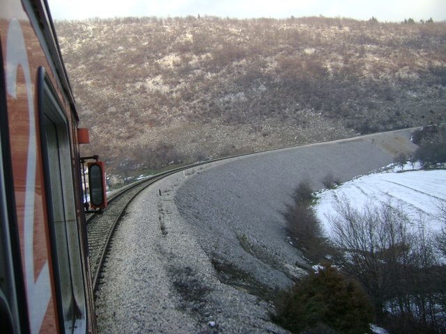 Zavoj na ulasku u Želj.kolodvor Vrhovine